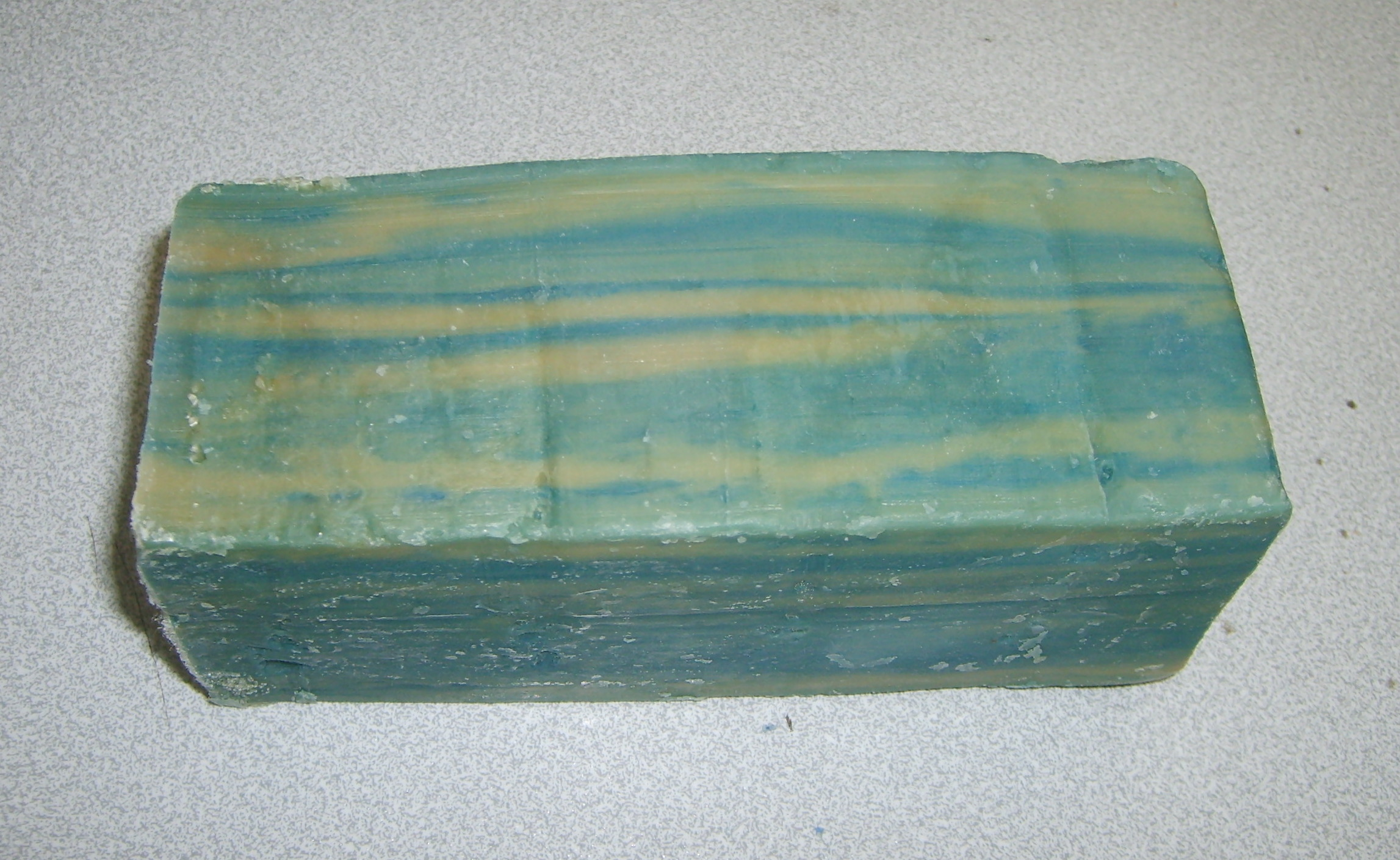 Sabao azul e Branco